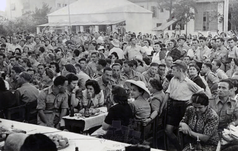 קבלת פנים לפדויי השבי